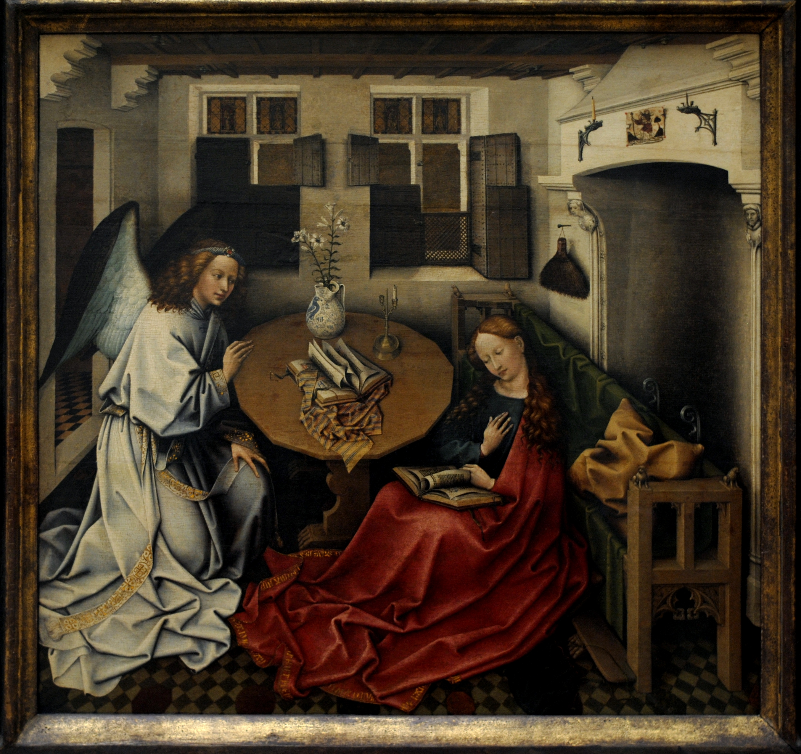 L'annonciation. Maître de Flémalle(Robert Campin?). Vers 1375